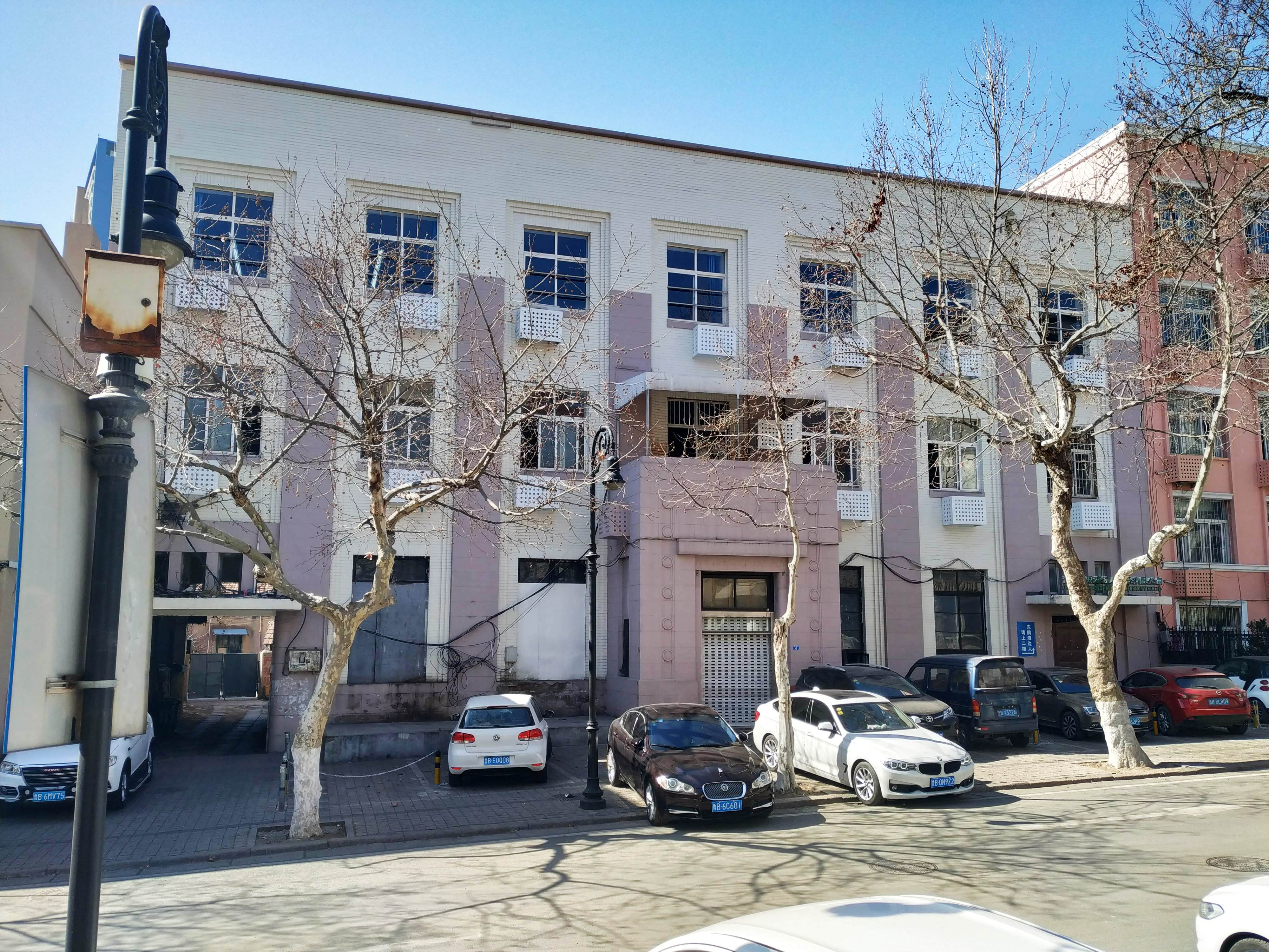 中文（中国大陆）: 山東起業株式會社舊址